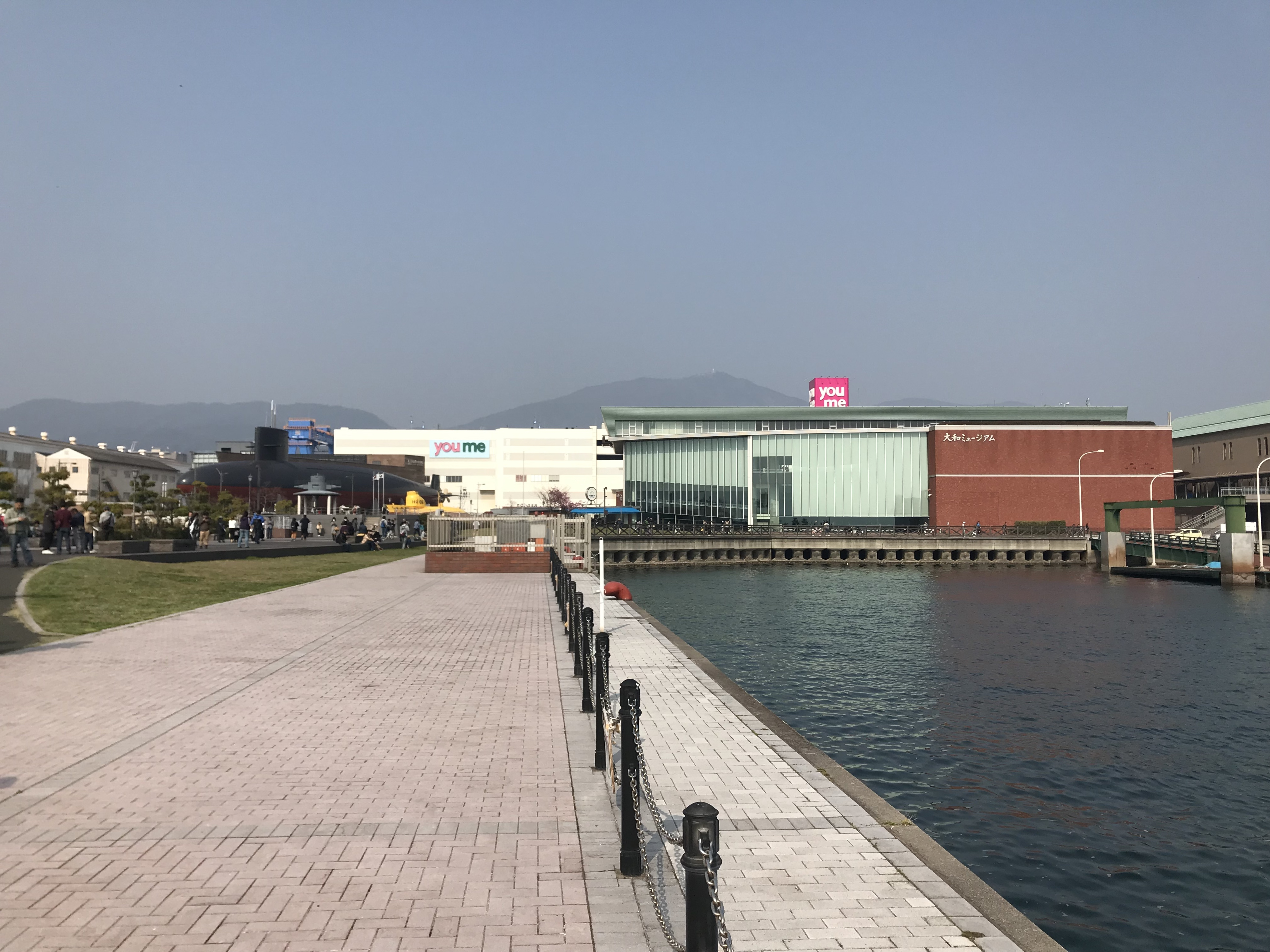 大和波止場より望む呉市海事歴史科学館とゆめタウン呉